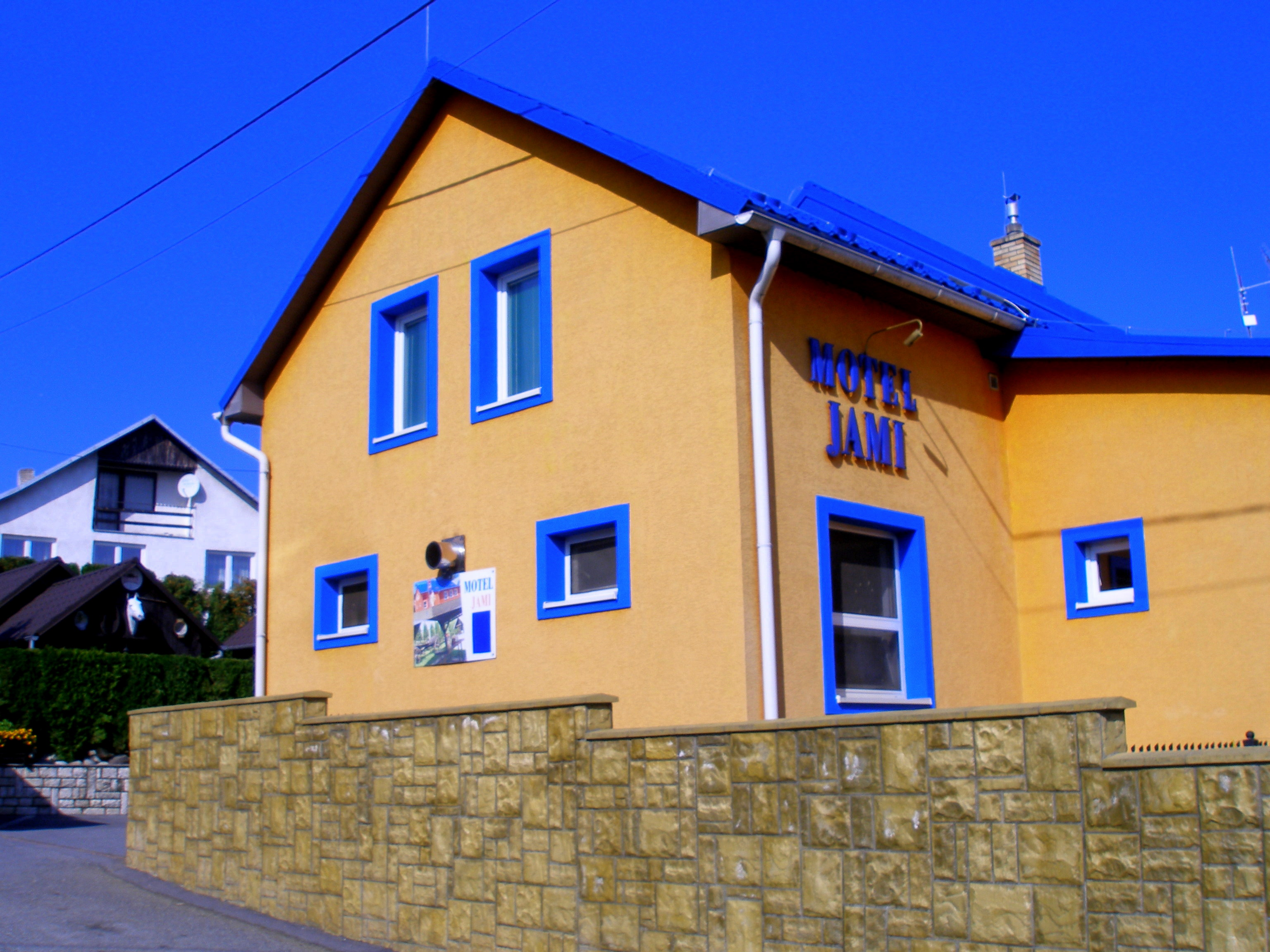 Motel Jami Kračúnovce, obec Kračúnovce, okres Svidník.